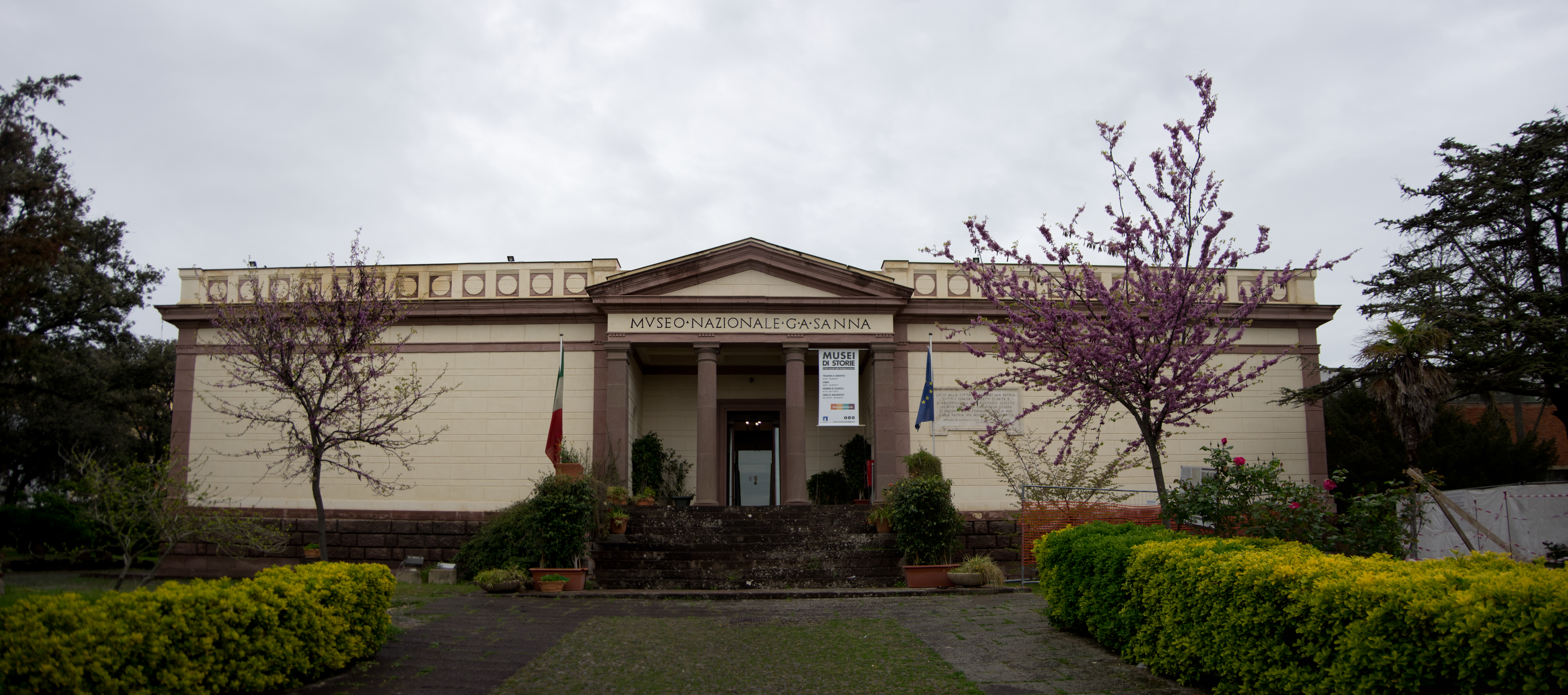 Sassari in Sardinien. Der Eingangsbereich des Museums Nazionale G. A. Sanna.